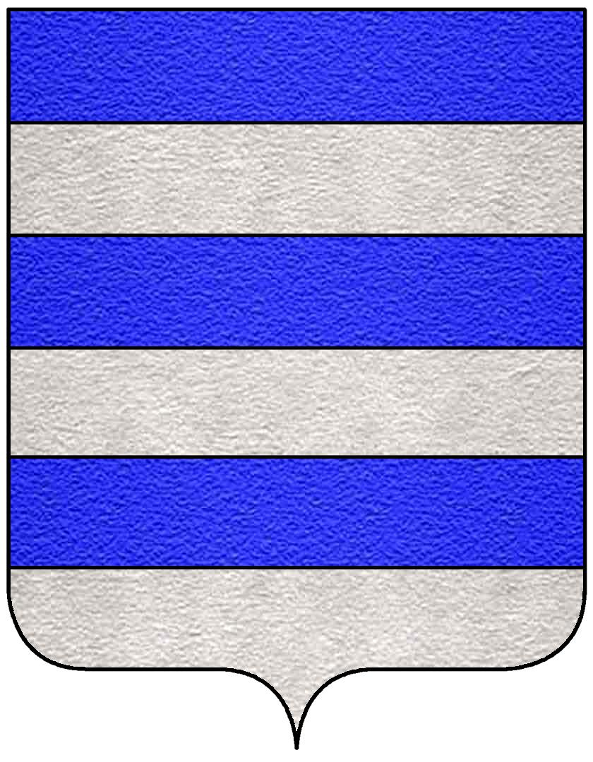 Stemma della famiglia Maggio